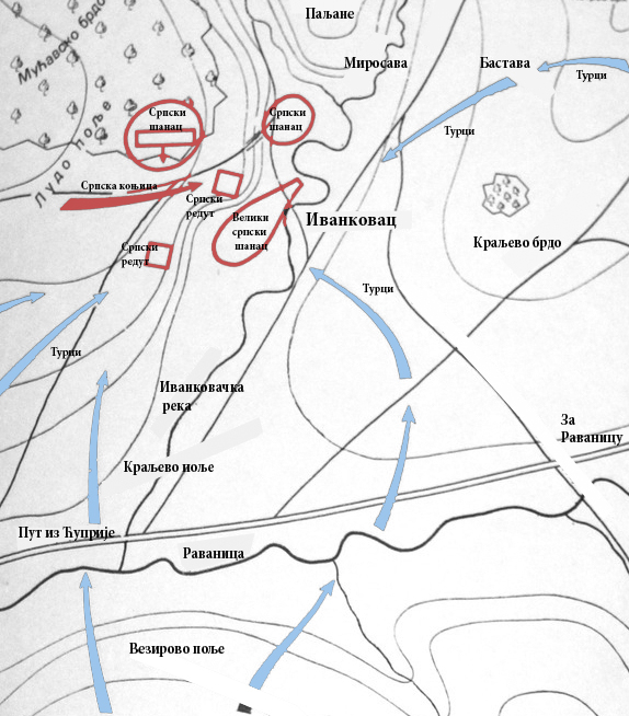 Српски (ћирилица): Скица боја на Иванковцу